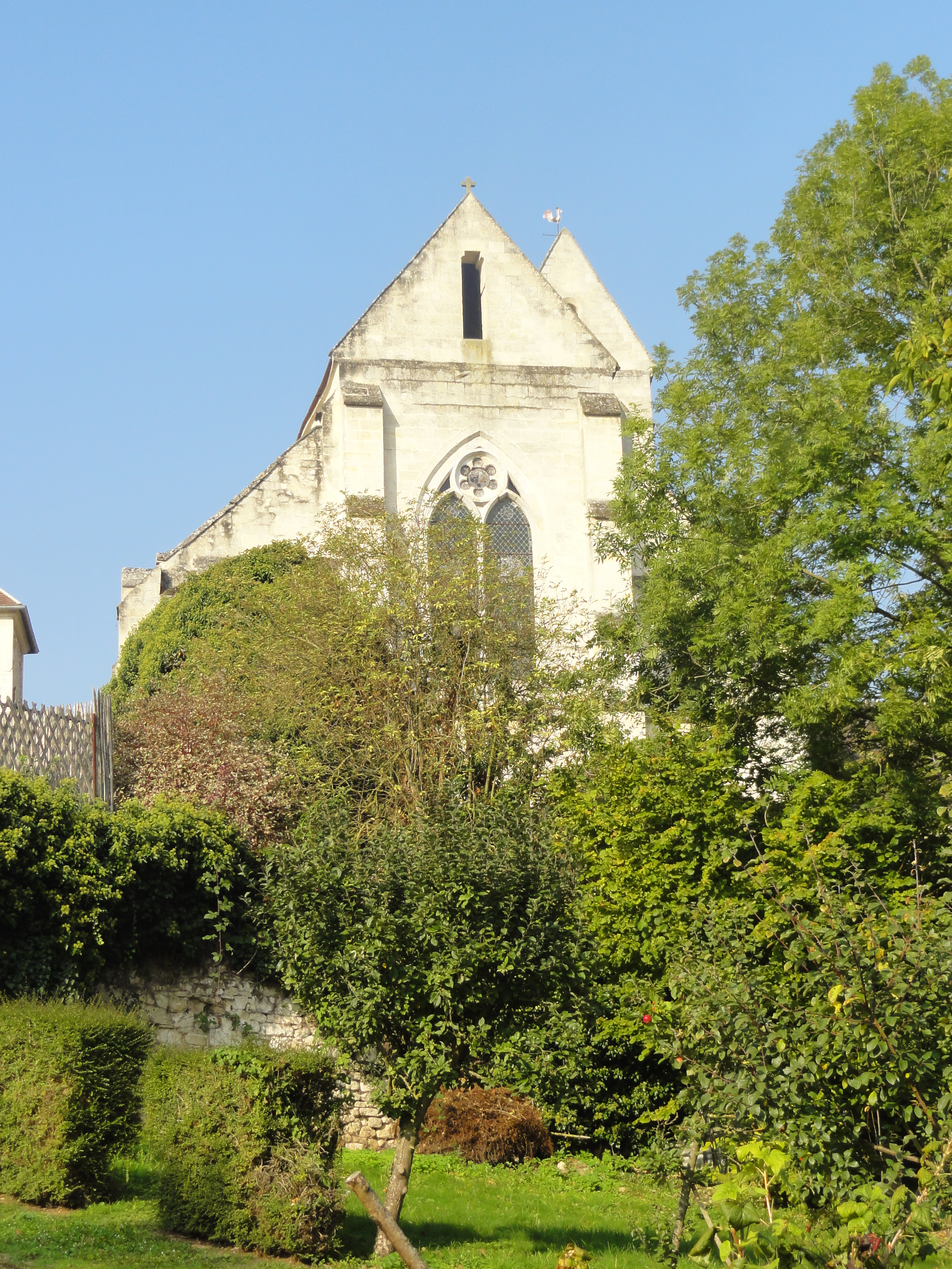 Chevet.